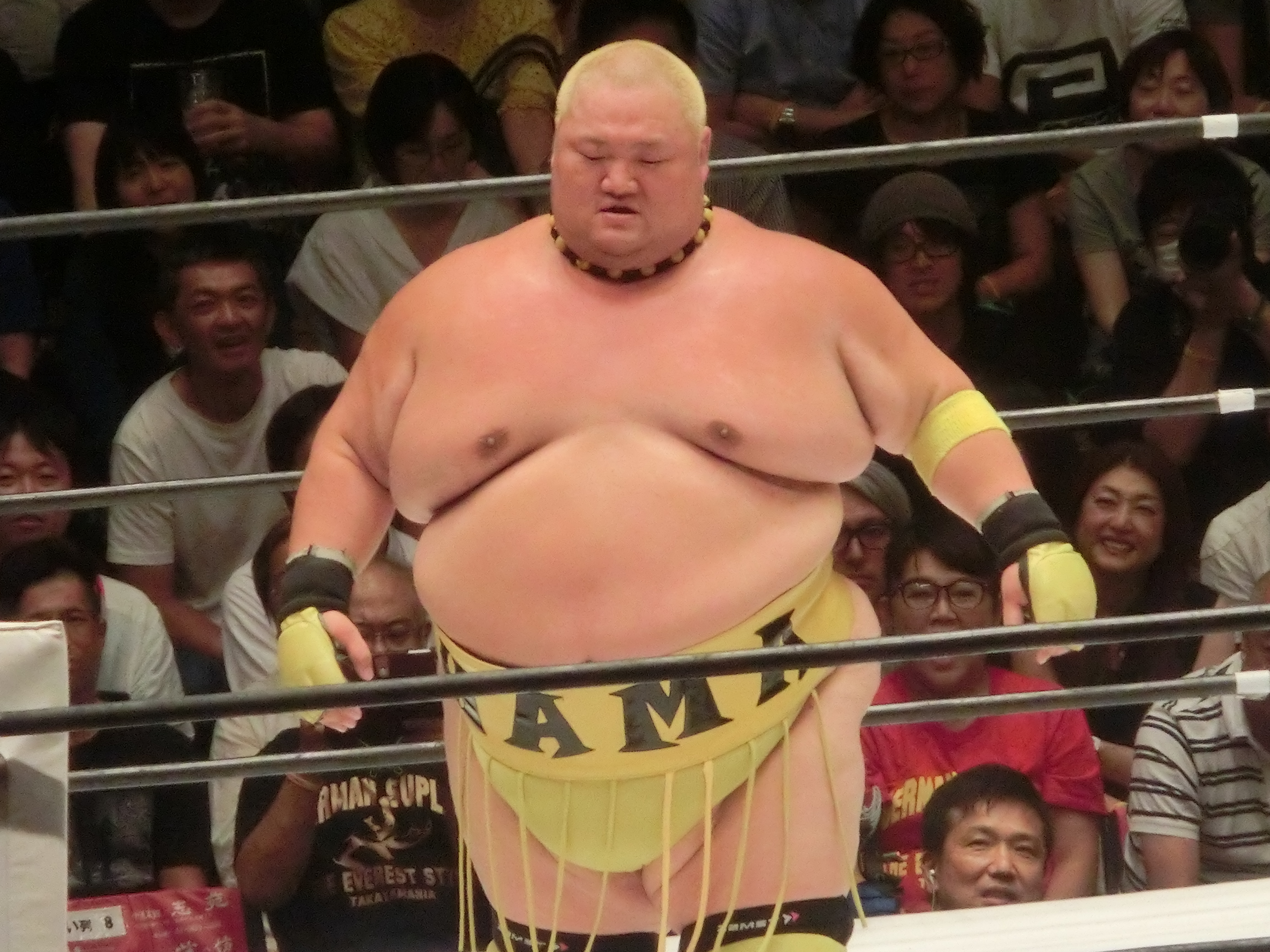 2018年8月31日、後楽園ホール